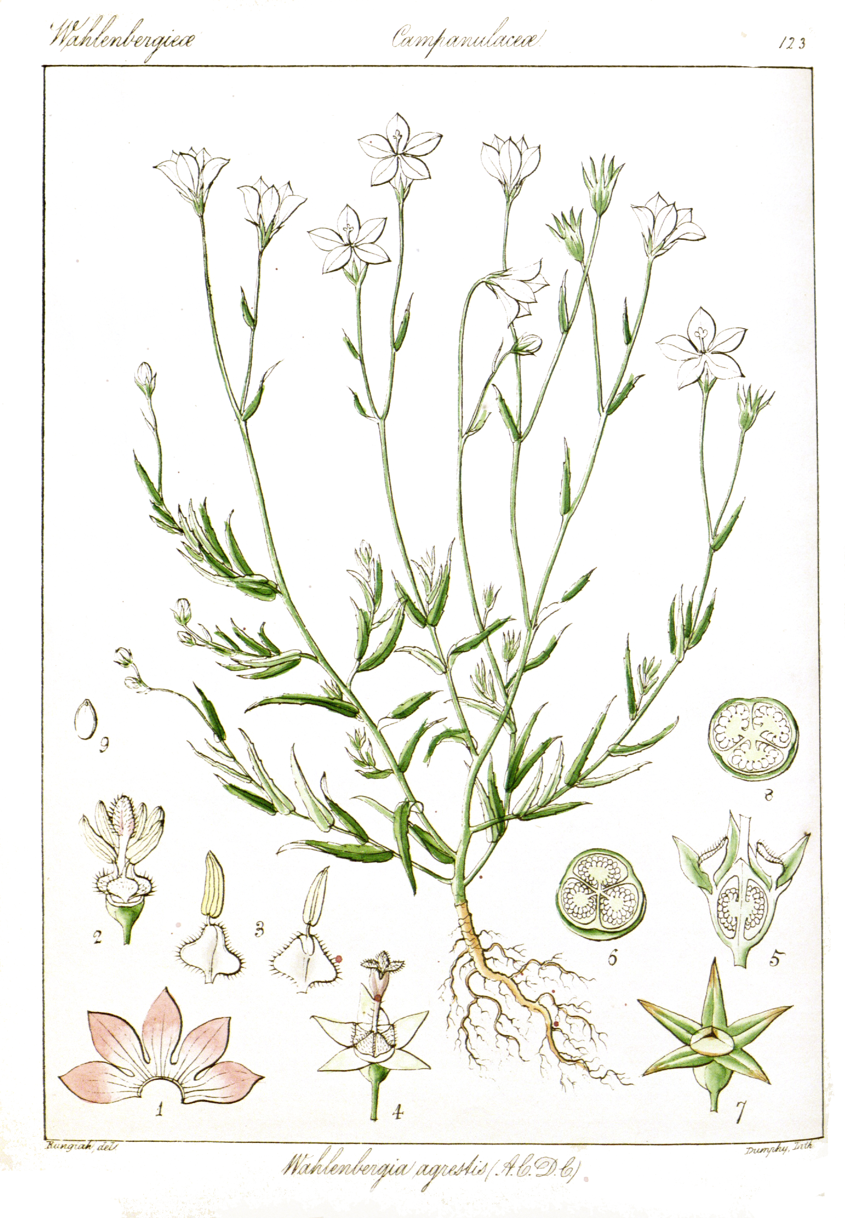 Wahlenbergia marginata (Thunb.) A. DC. [as Wahlenbergia agrestis (Wall.) A. DC.]